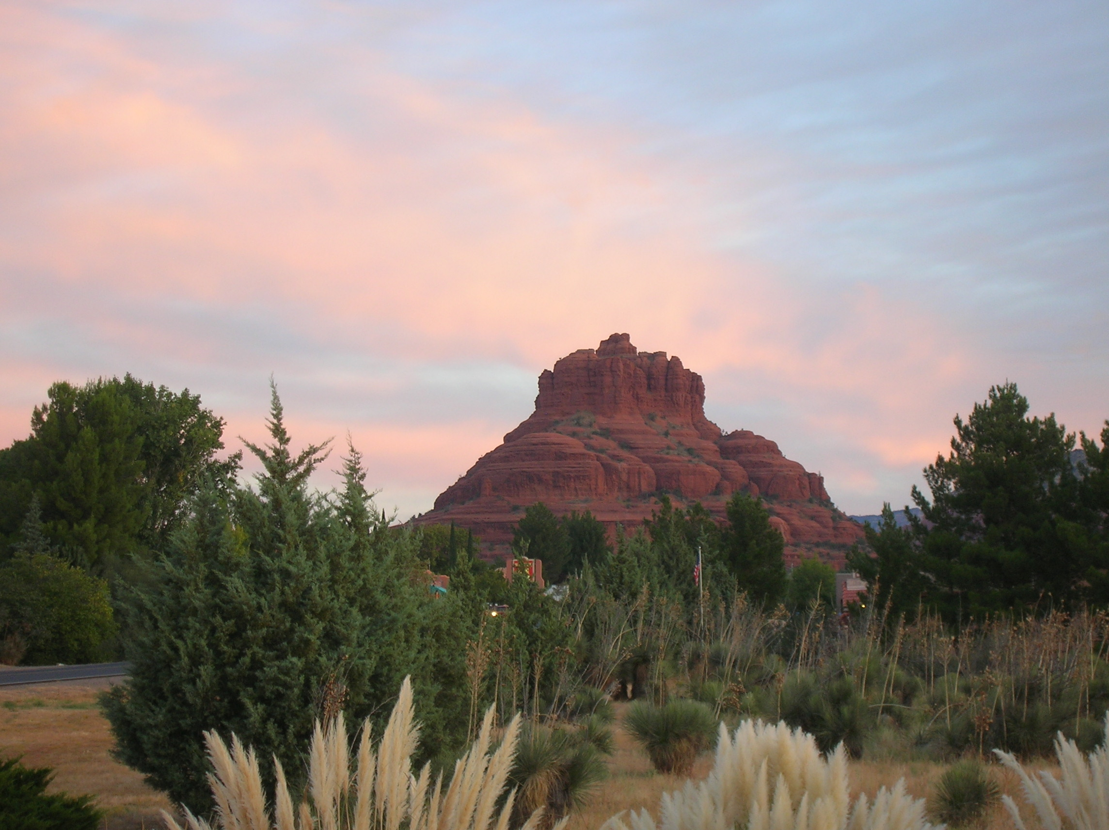 Bell Rock near Sedona, Arizona